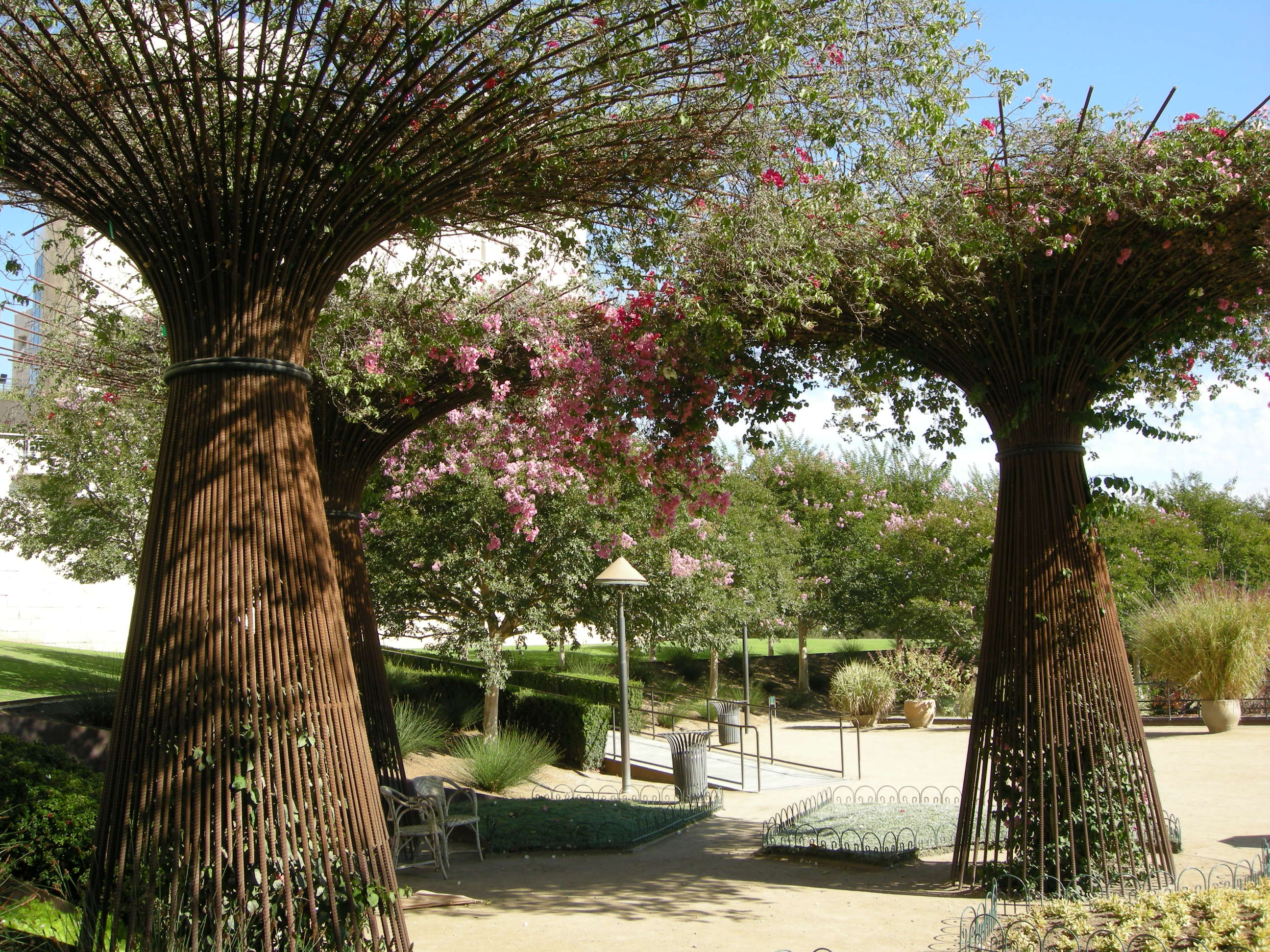 Getty Center - Gardens